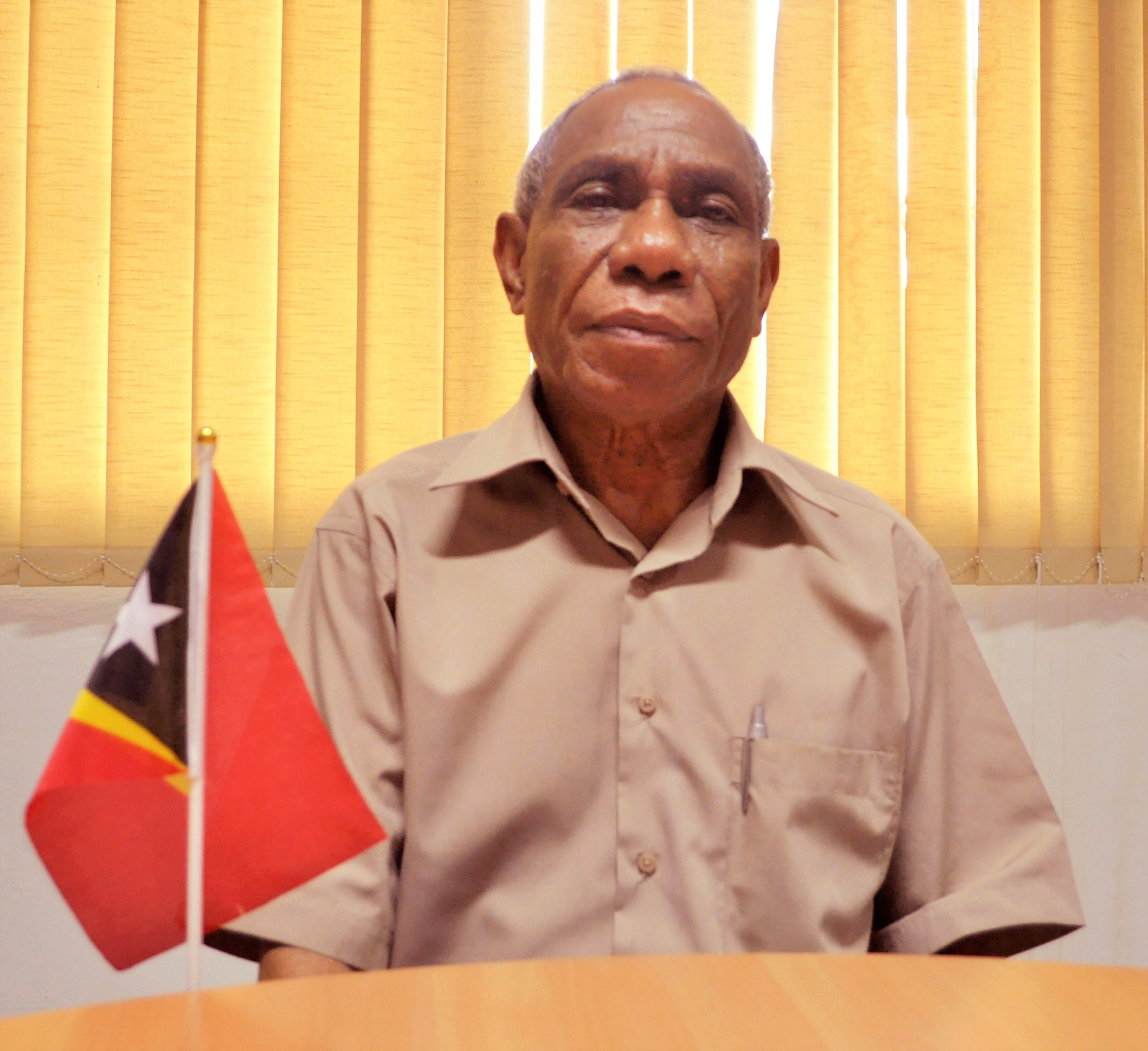 Francisco da Silva, Administrator der Gemeinde Viqueque